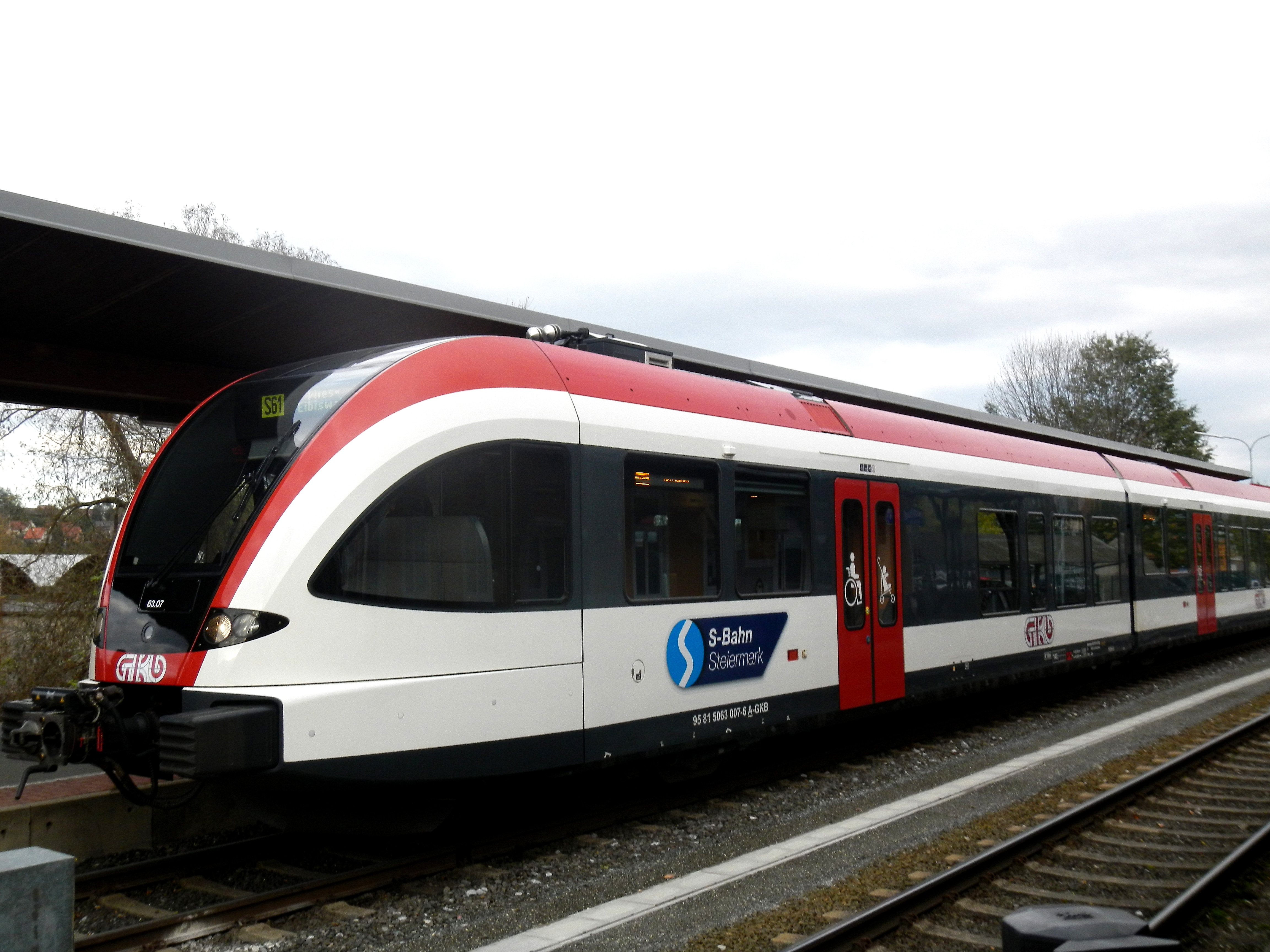 Bahnhof Deutschlandsberg der Graz-Köflacher-Bahn, Einfahrt eines Zuges Richtung Wies-Eibiswald